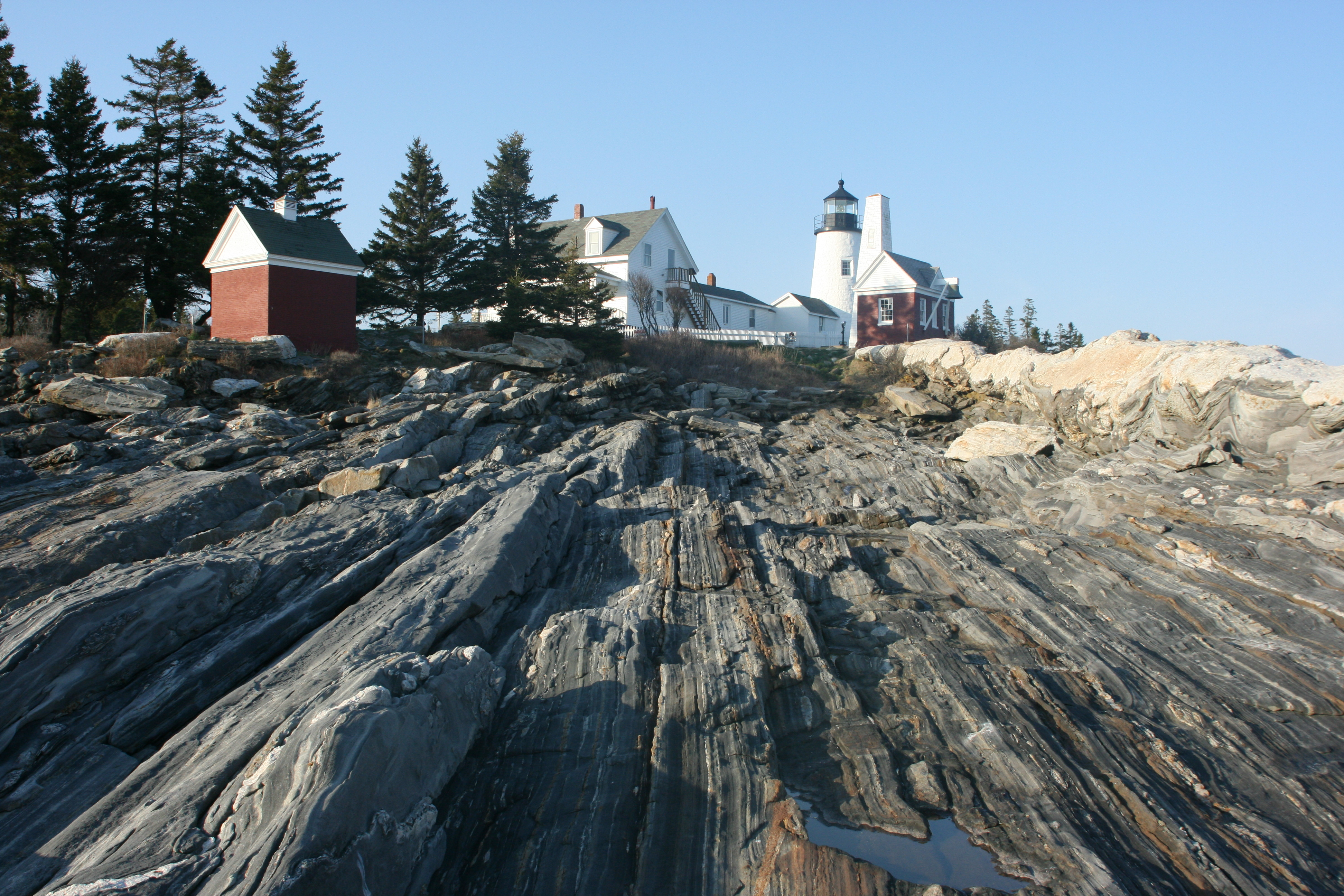 Pemaquid Point, Maine